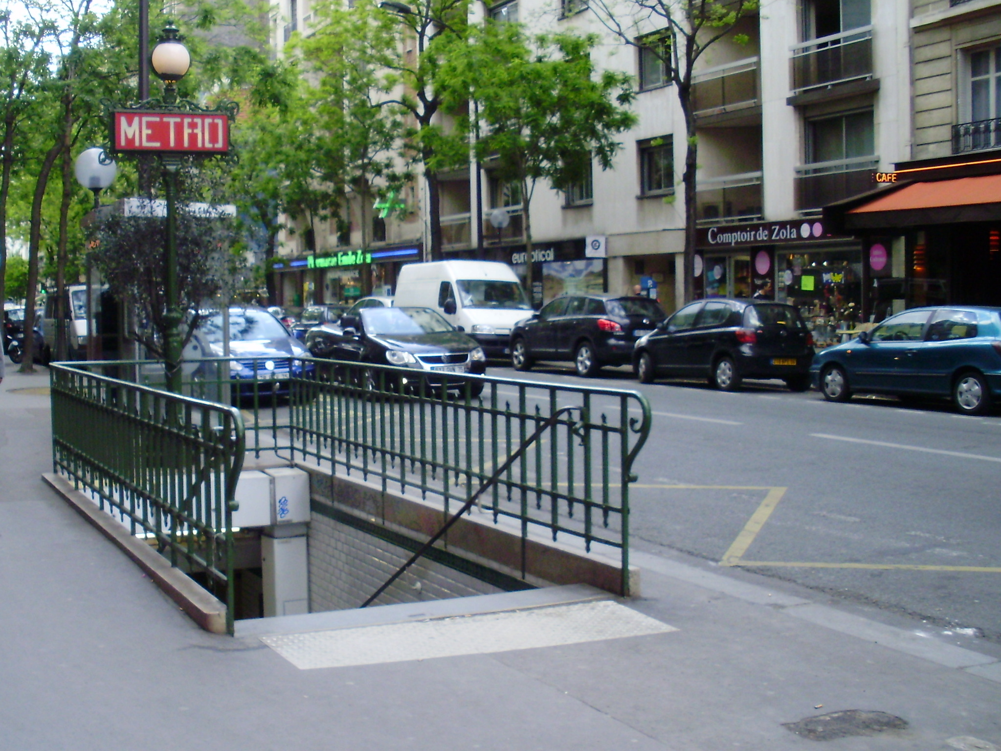 Une des entrées de la station « Avenue Émile Zola » du métro de Paris